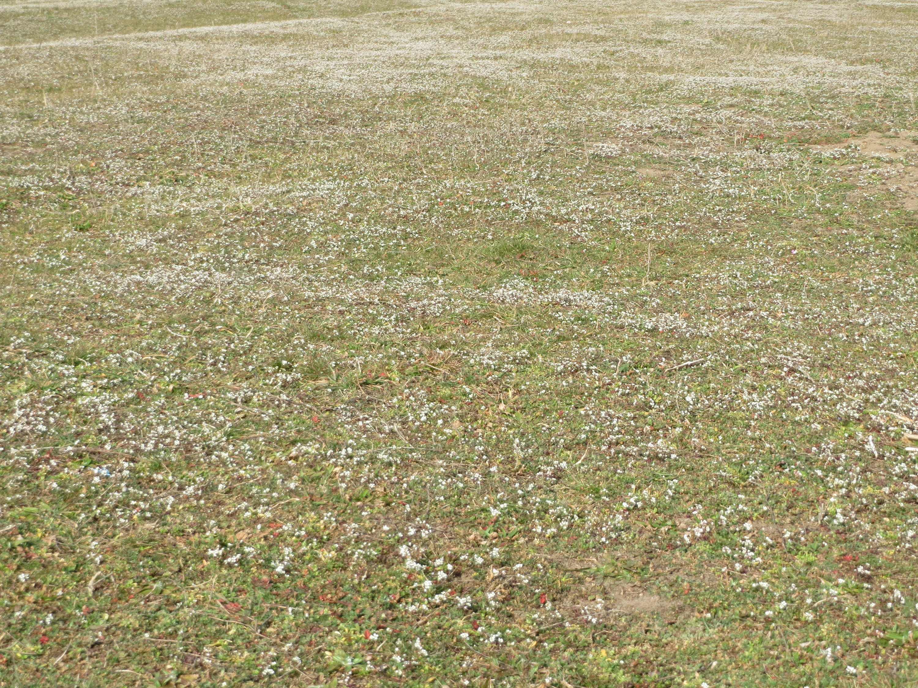 Blütenteppich von Frühlings-Hungerblümchen (Draba verna) in Hockenheim